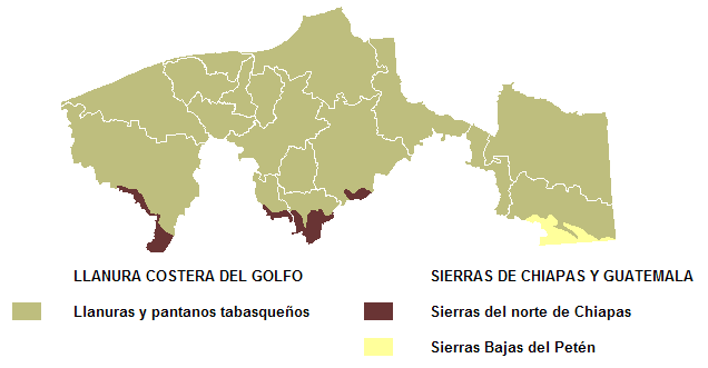 Mapa fisiográfico de Tabasco